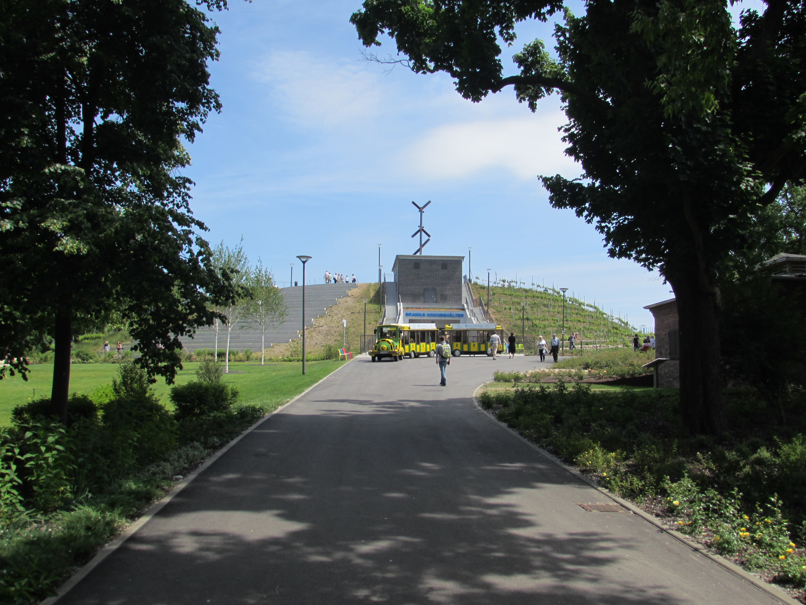 laubengang marienberg brandenburg